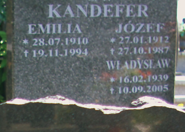 Grobowiec rodzinny Władysława Kandefera (1939-2005) na starym cmentarzu w Iwoniczu.